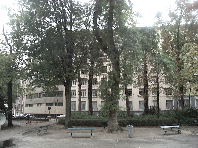 Eeuwfeestkliniek, Antwerp, Belgium